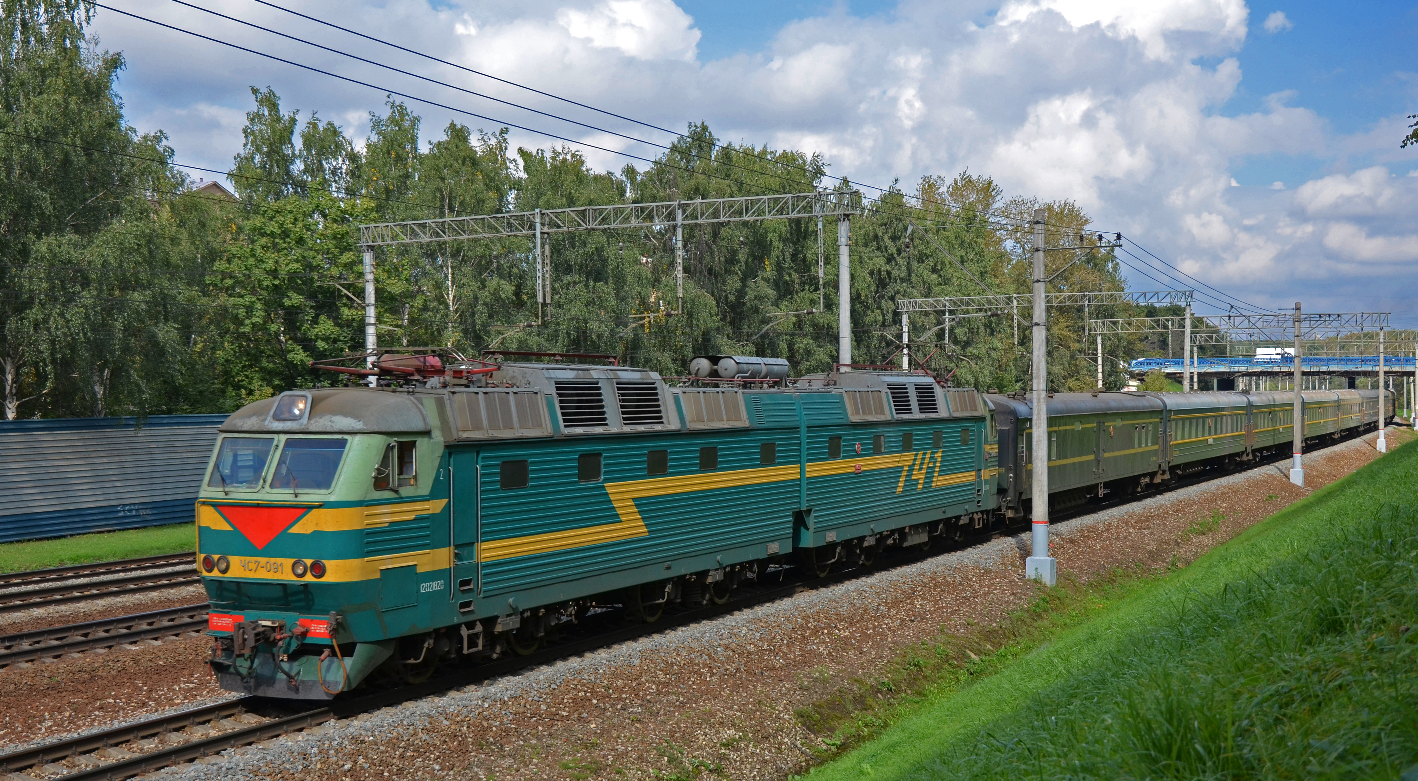 ЧС7-091 с поездом 003З Пекин - Москва